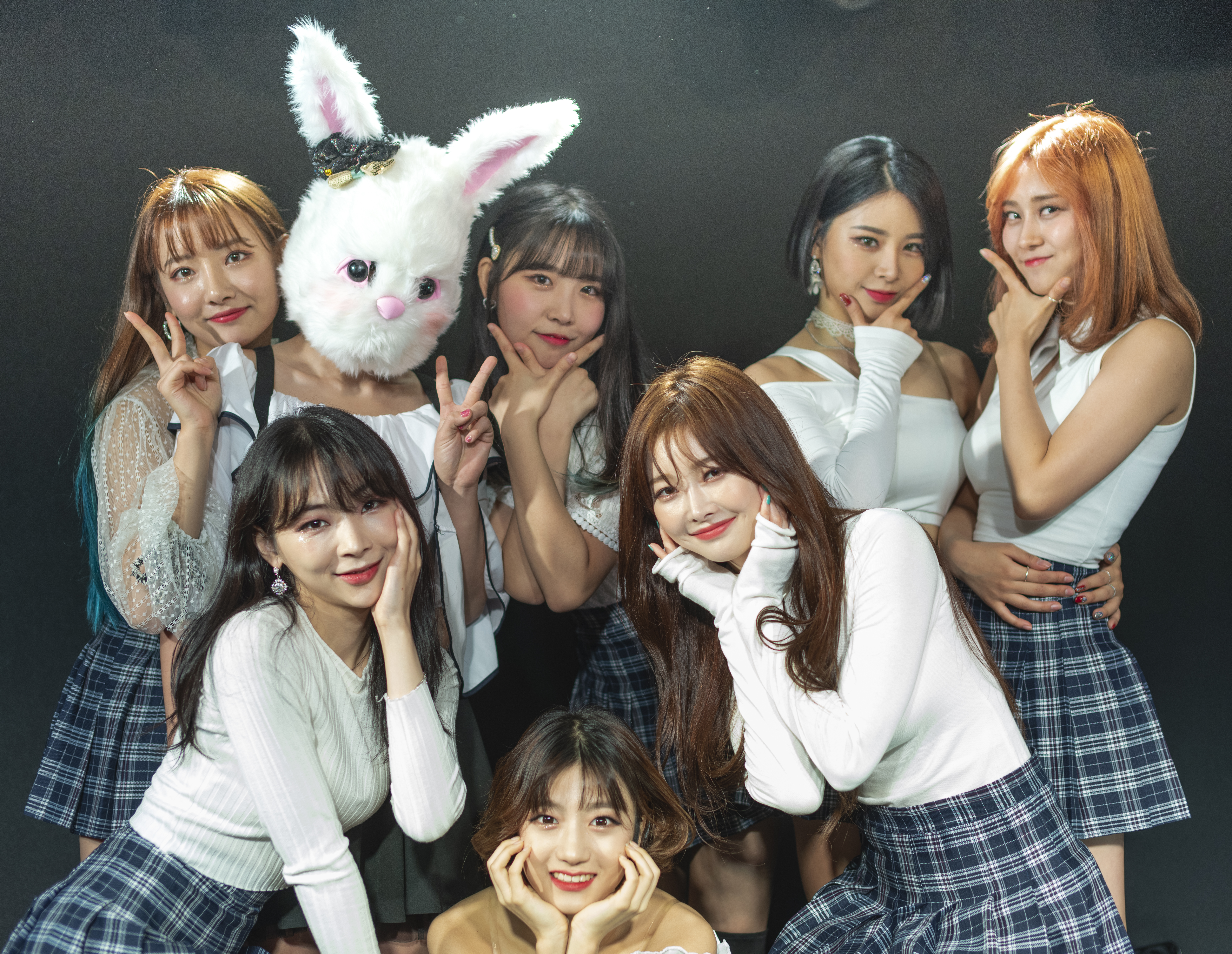 Pinkfantasy TokyoConcert 20191217 一部 1